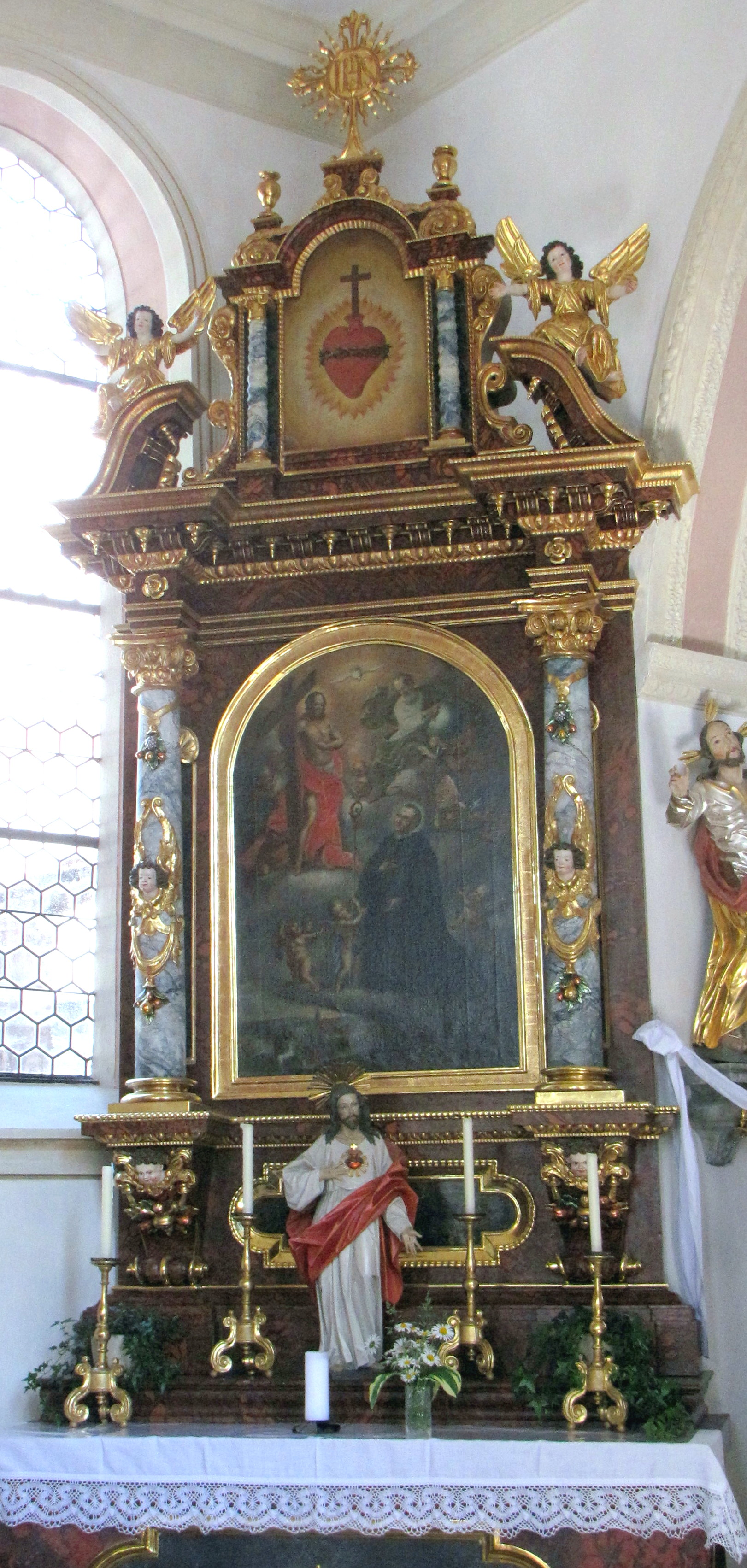 Der Hl. Leonhard zu Füßen der Hl. Dreifaltigkeit über Landschaft mit Darstellung des Ortes Thalhofen von Ignaz Baldauf, signiert "Ig Baldauf pinxit"